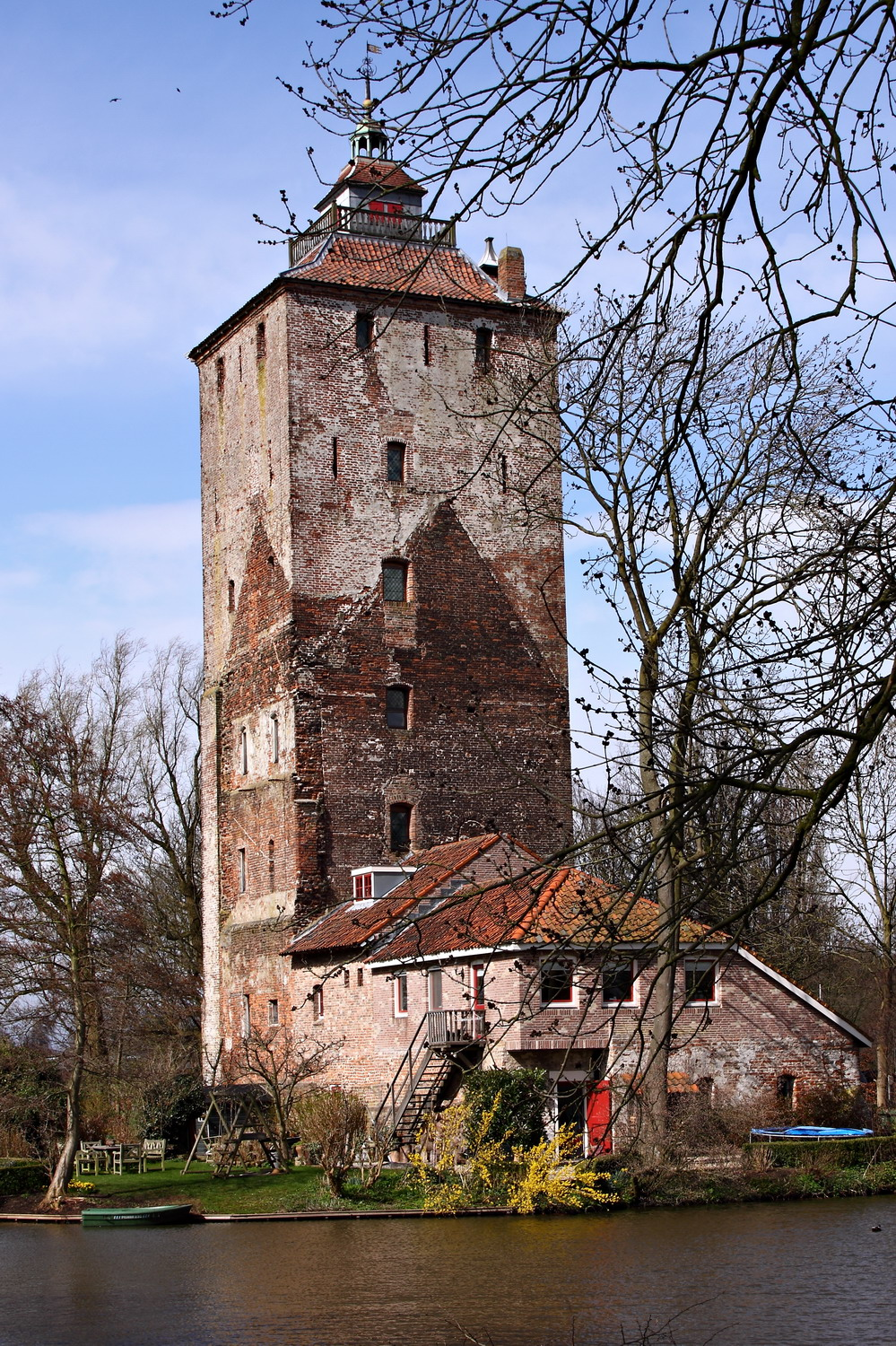 De Middeleeuwse Hamtoren bij Vleuten, van over het water genomen